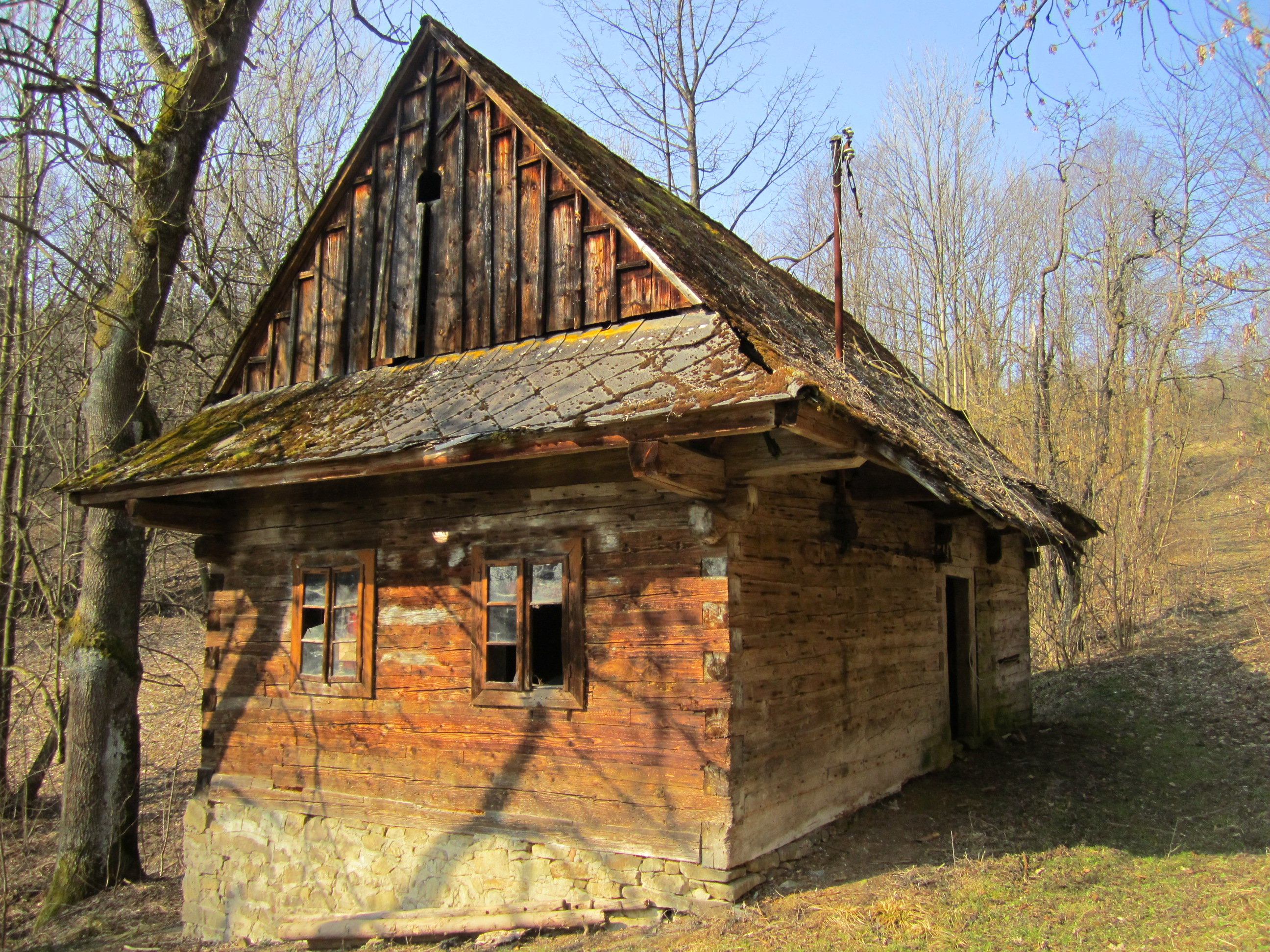 Divina, na Vŕšku, dom postavený v roku 1907